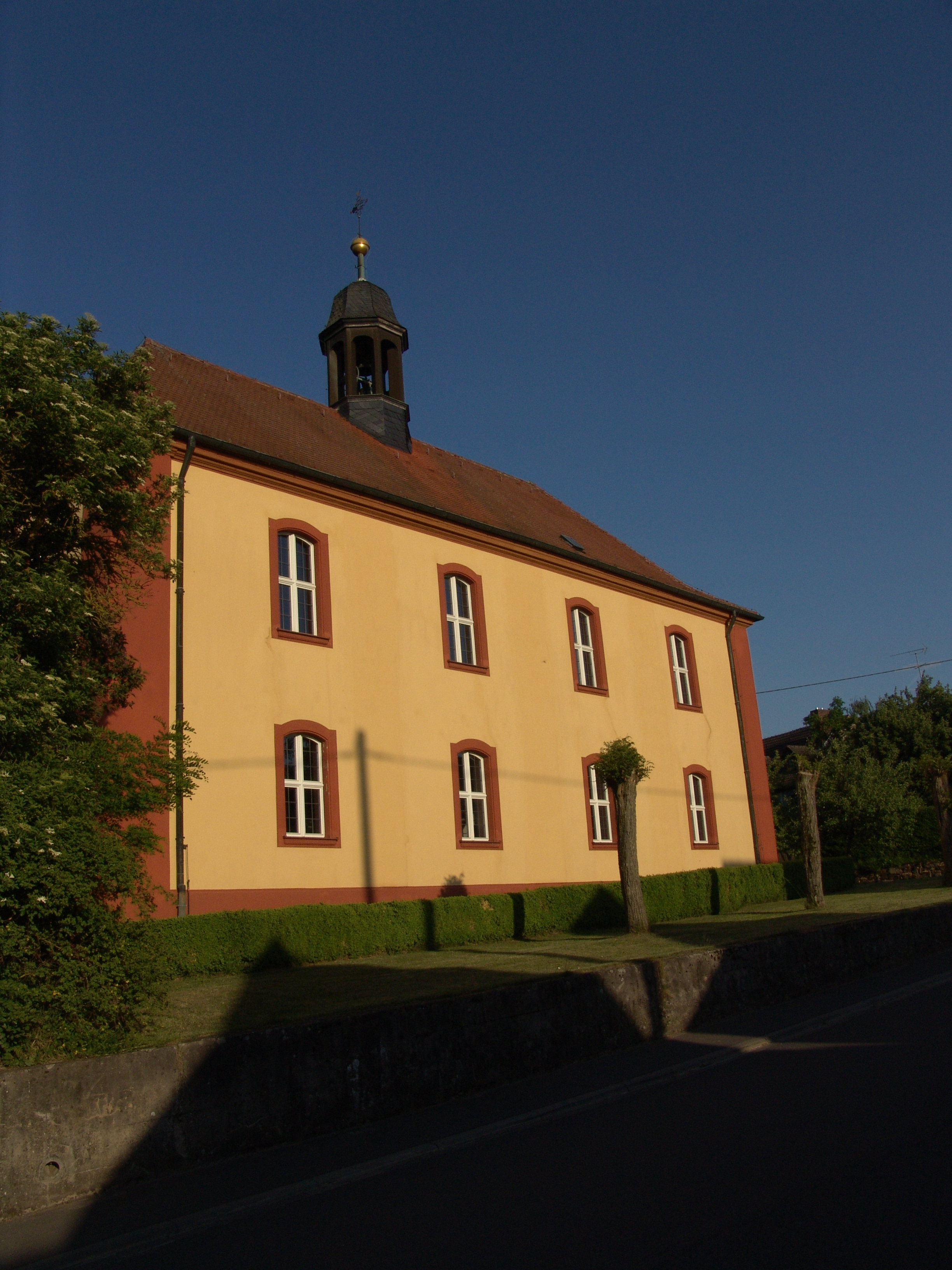 evang.-luth. Kirche in Rehweiler